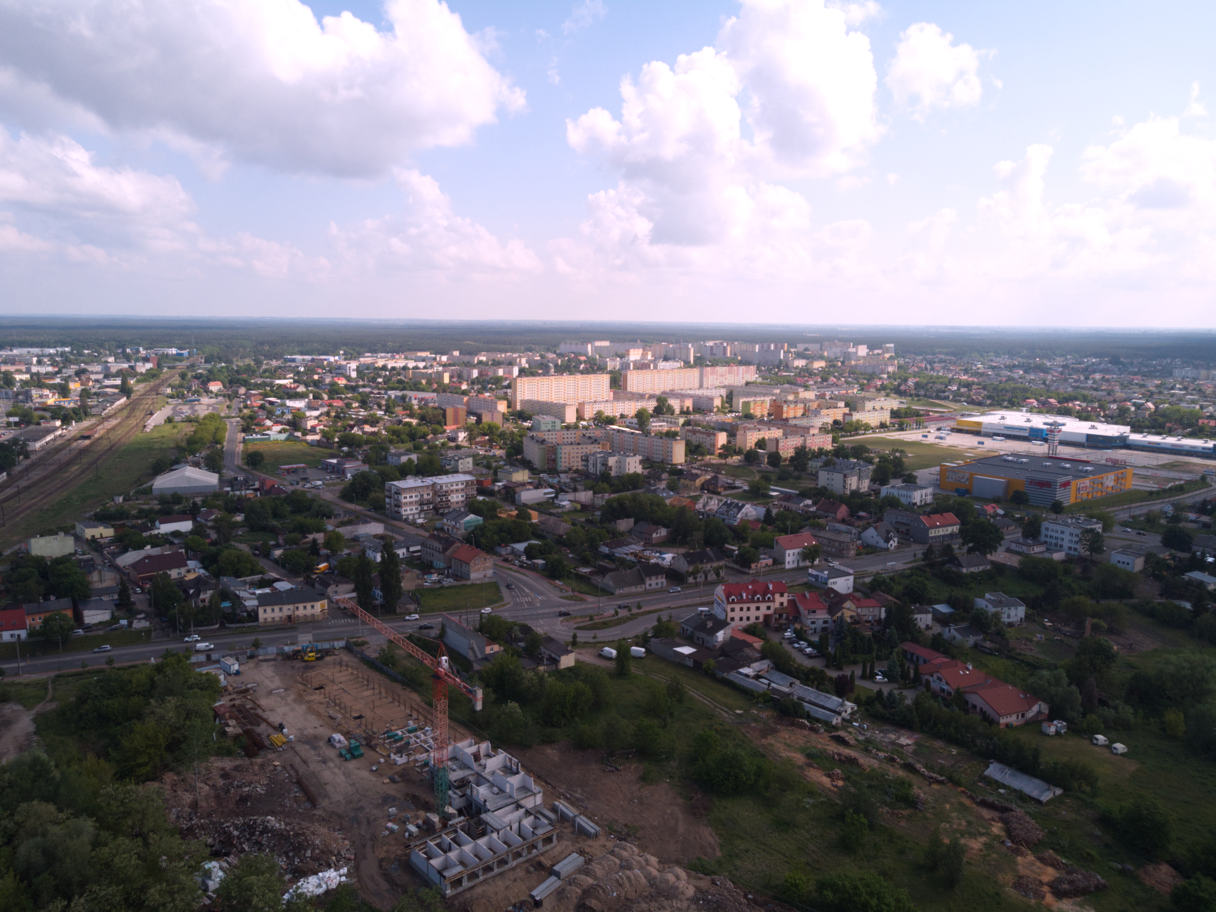 Południe (2020 r.)